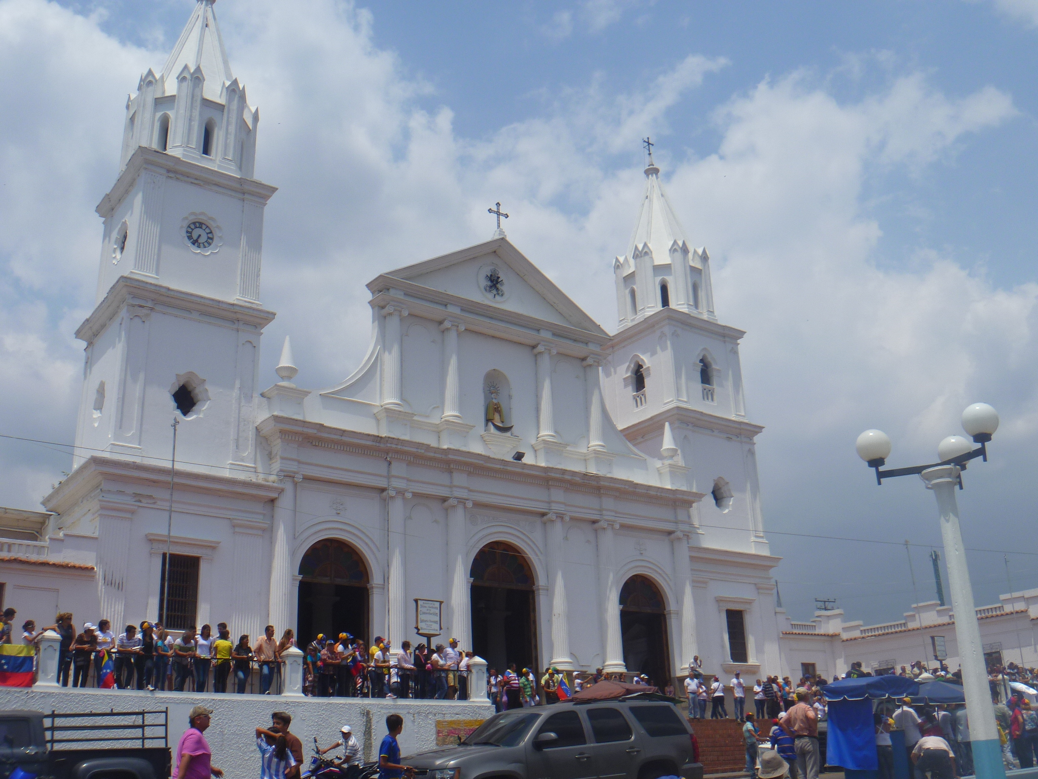 Táriba